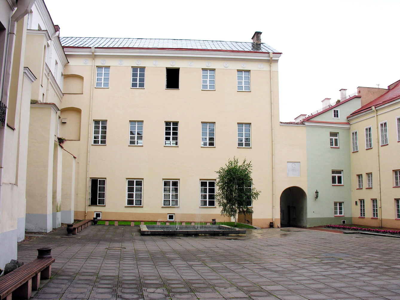 Vilniaus universitetas Sarbievijaus kiemo vakaru pusė Foto: Algirdas, 2006 m. rugpjūčio 8 d., Lietuva